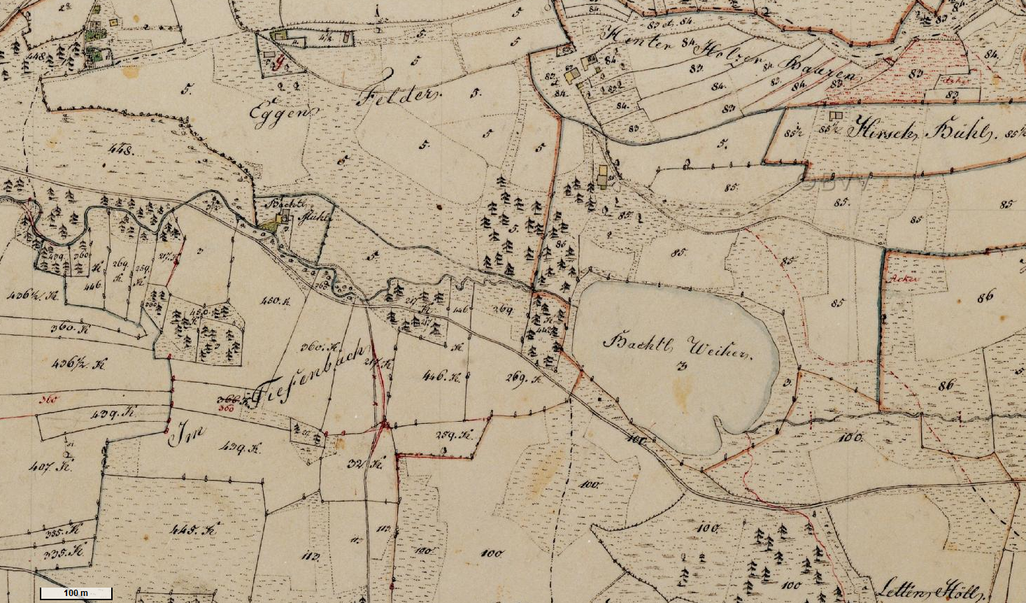 historische Flurkarte mit Bachtelmühle und Bachtelweiher, Gemarkung Sankt Mang, Stadt Kempten, Bayern